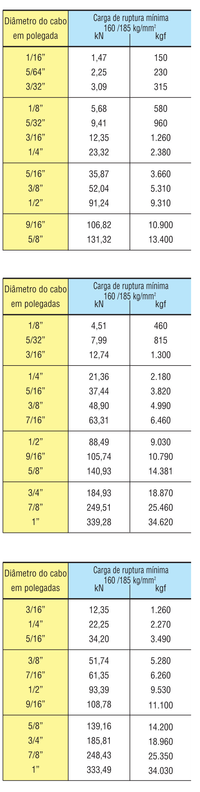 Tabela de Resistência